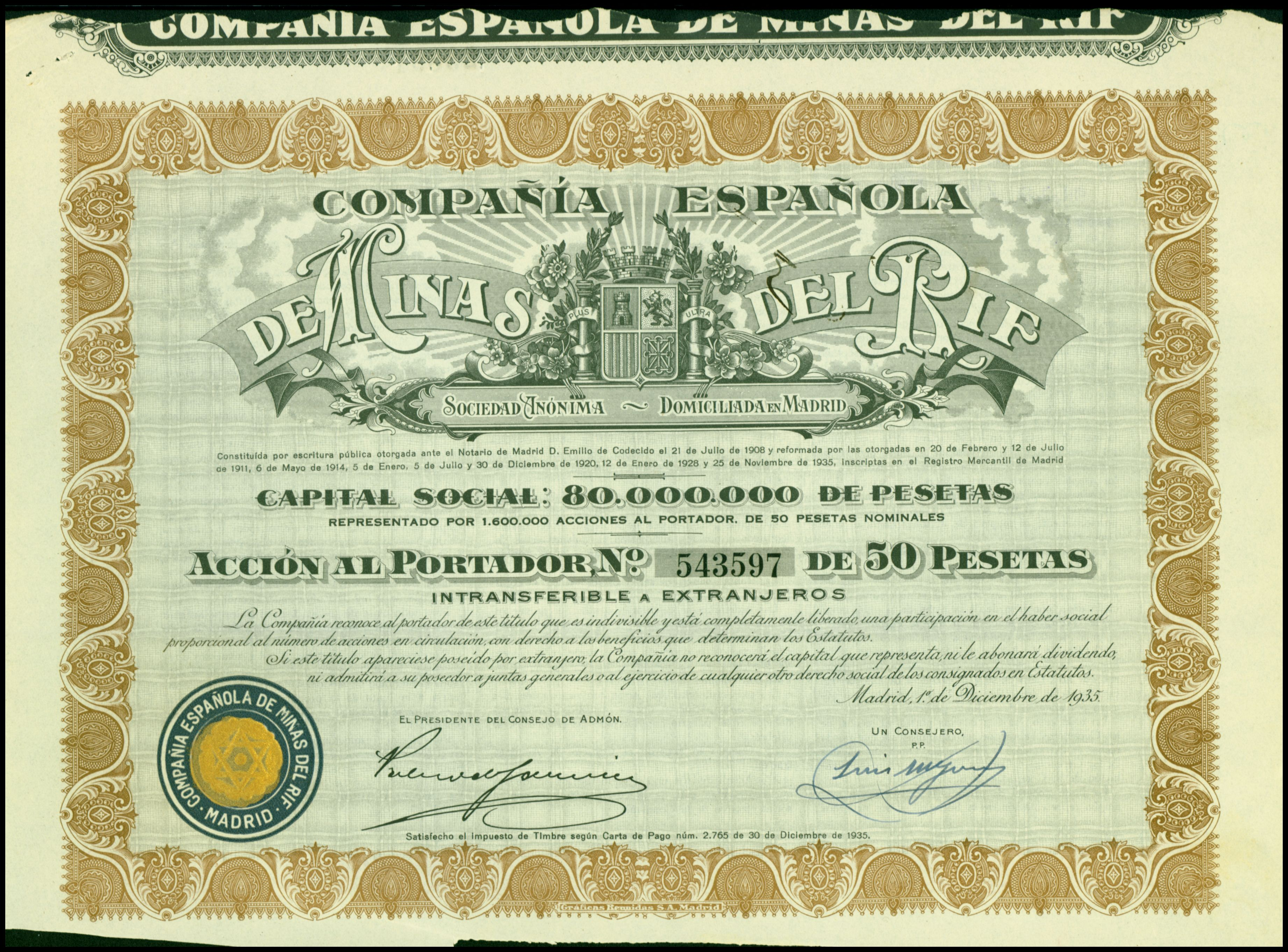 Aktie über 50 Peseten der Compañía Española de Minas del Rif von 1935; aus dem Fundus des Ersten Deutschen Historic-Actien-Museum e.V. (EDHAM), Kürnbach